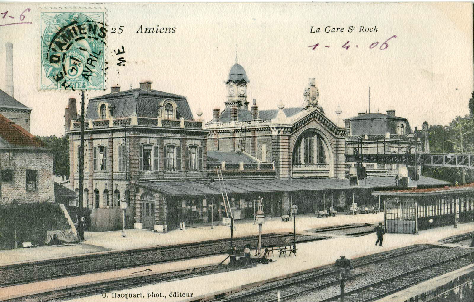 Carte postale ancienne éditée par O. Hacquart, n°25 : AMIENS - La Gare St. Roch